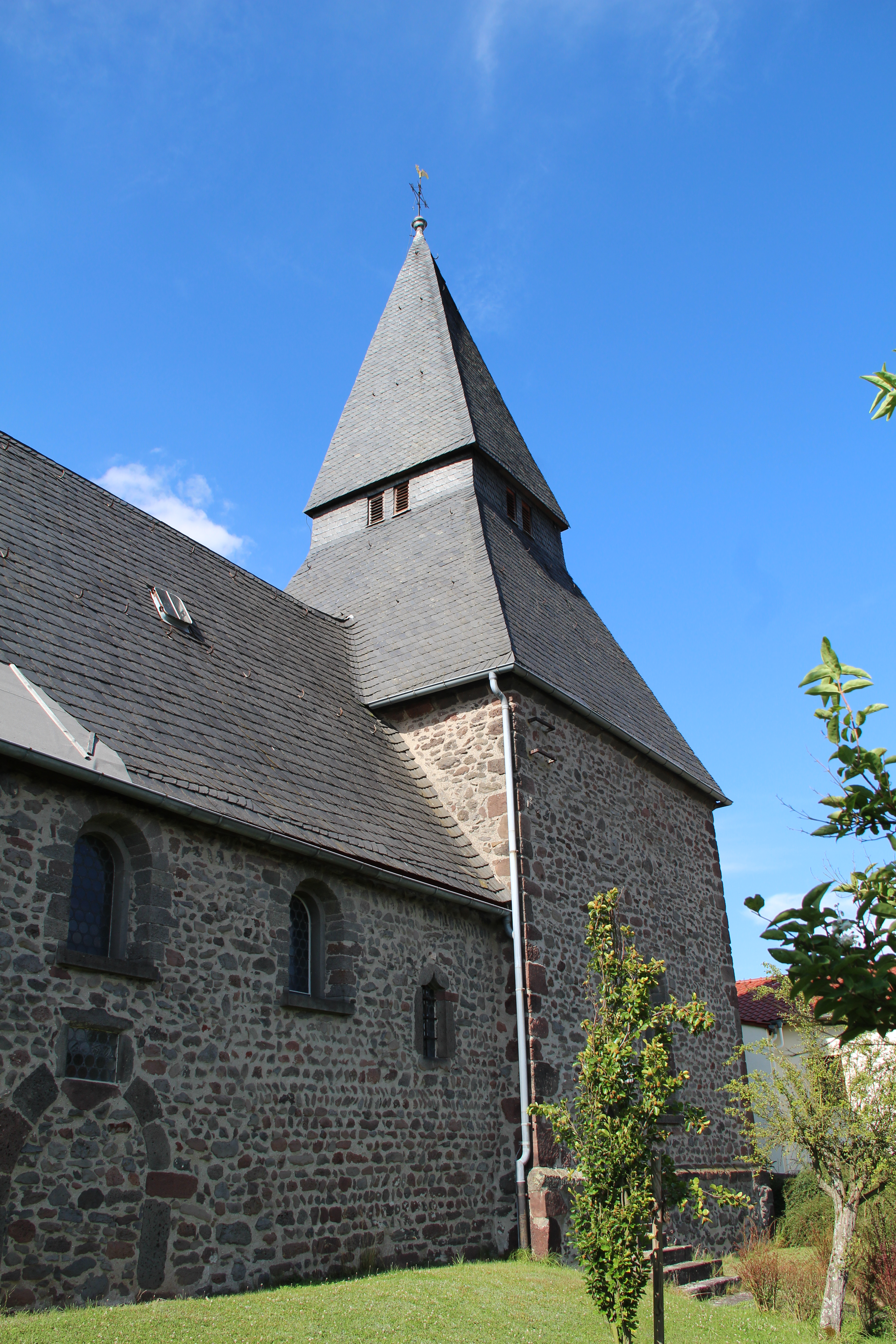 Südseite der Kirche von Odenhausen (Lumda), Kreis Gießen, Hessen, Deutschland